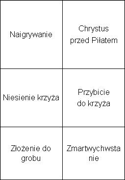 opis pól dawnego ołtarza głównego kościoła św. Jana w Stargardzie Szczecińskim.